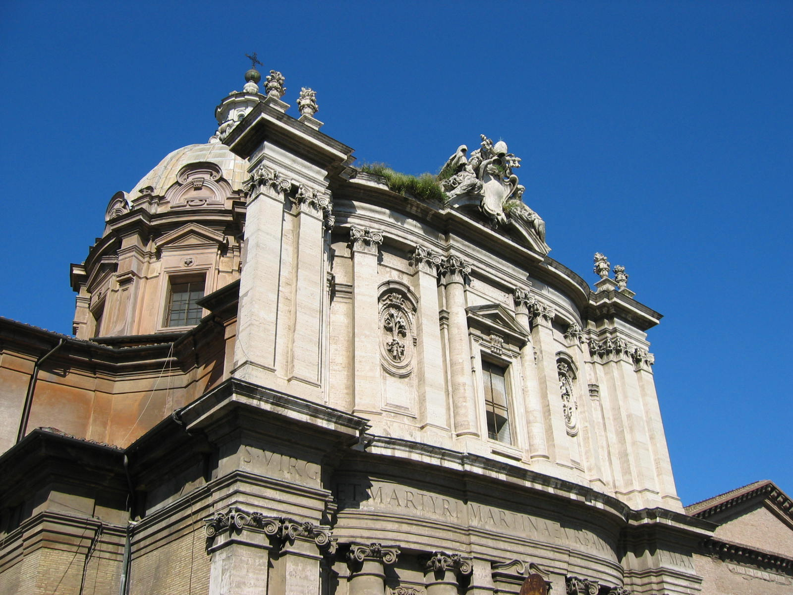 Chiesa dei Santi Luca e Martina, Roma. Facciata e cupola di Pietro da Cortona. Picture by Torvindus.